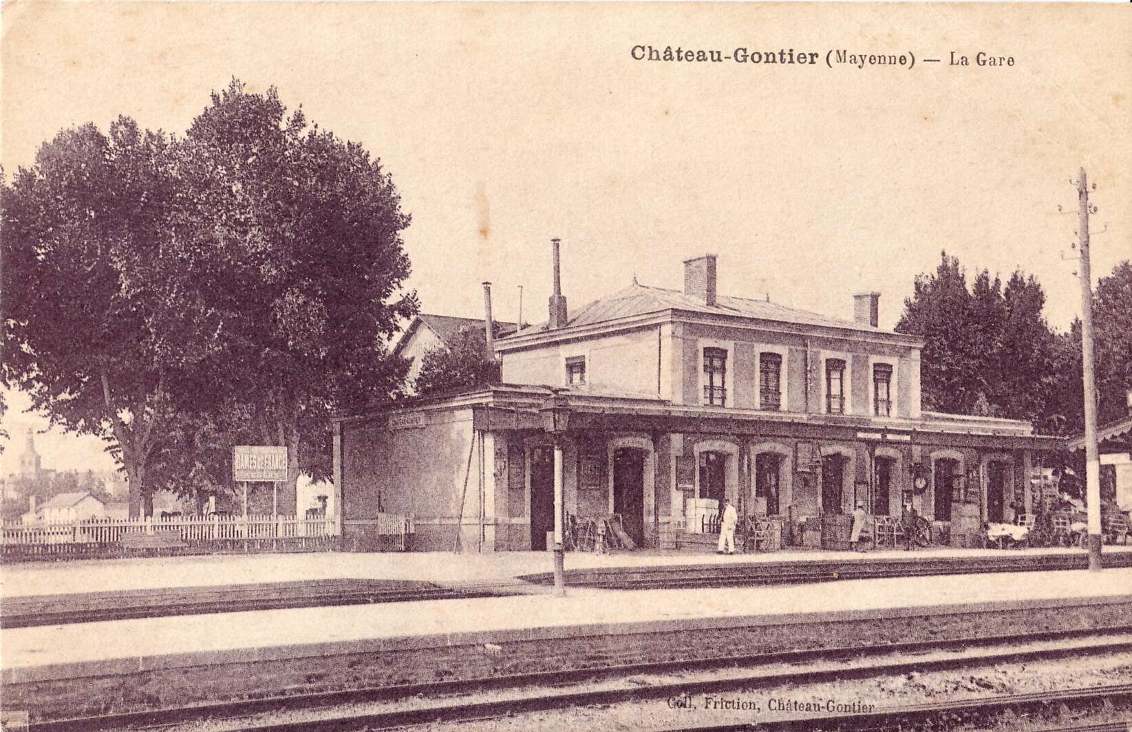 Carte postale ancienne éditée par Friction à Château-Gontier - La Gare